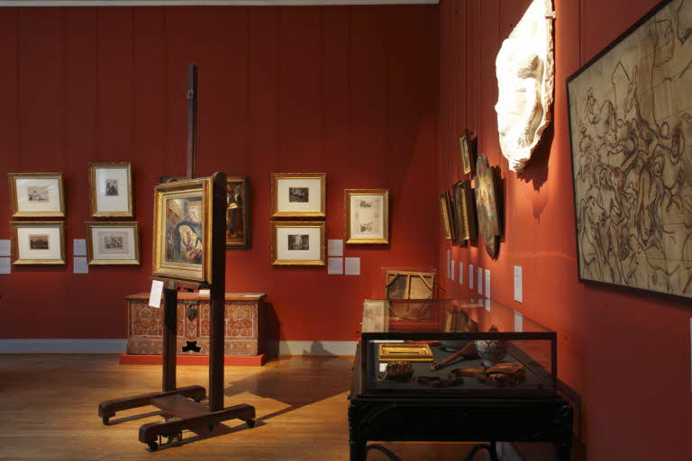 Intérieur de l'atelier d'Eugène Delacroix, 6 rue de Furstemberg, 75006 Paris.